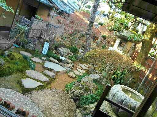 岐阜県美濃市の重要伝統的建造物群保存地区の旧美濃町にある旧今井家住宅の中庭